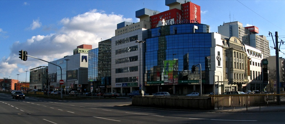 Aleja marsz. Józefa Piłsudskiego w Łodzi